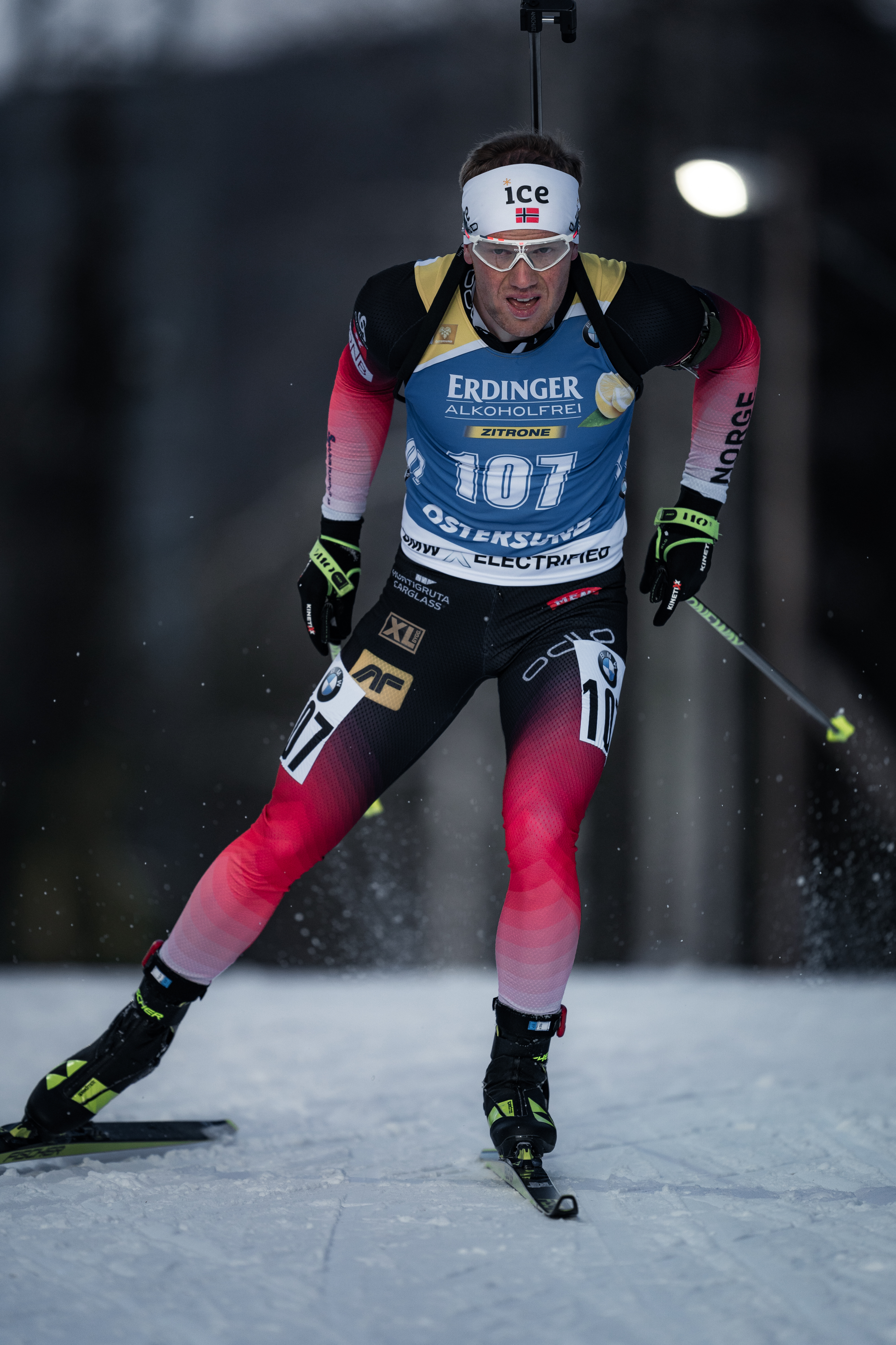 Foto tatt av Sondre Eriksen Hensema